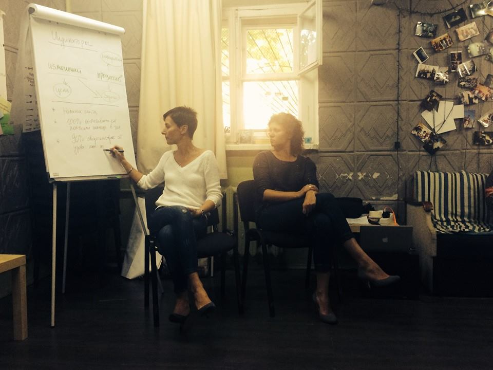 Тренинг "Проектный подход в планировании деятельности молодежных организаций/инициатив"